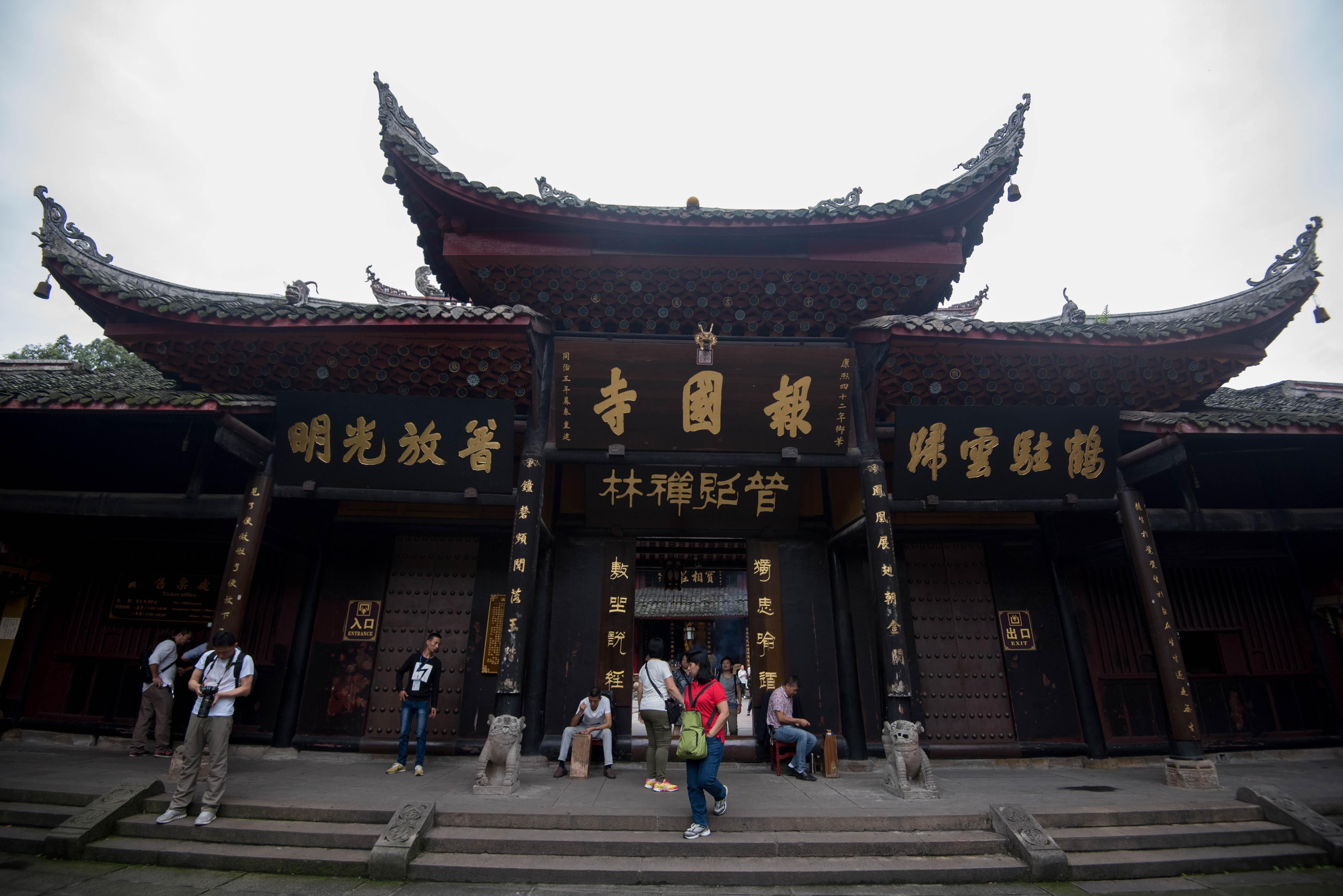 峨眉山报国寺